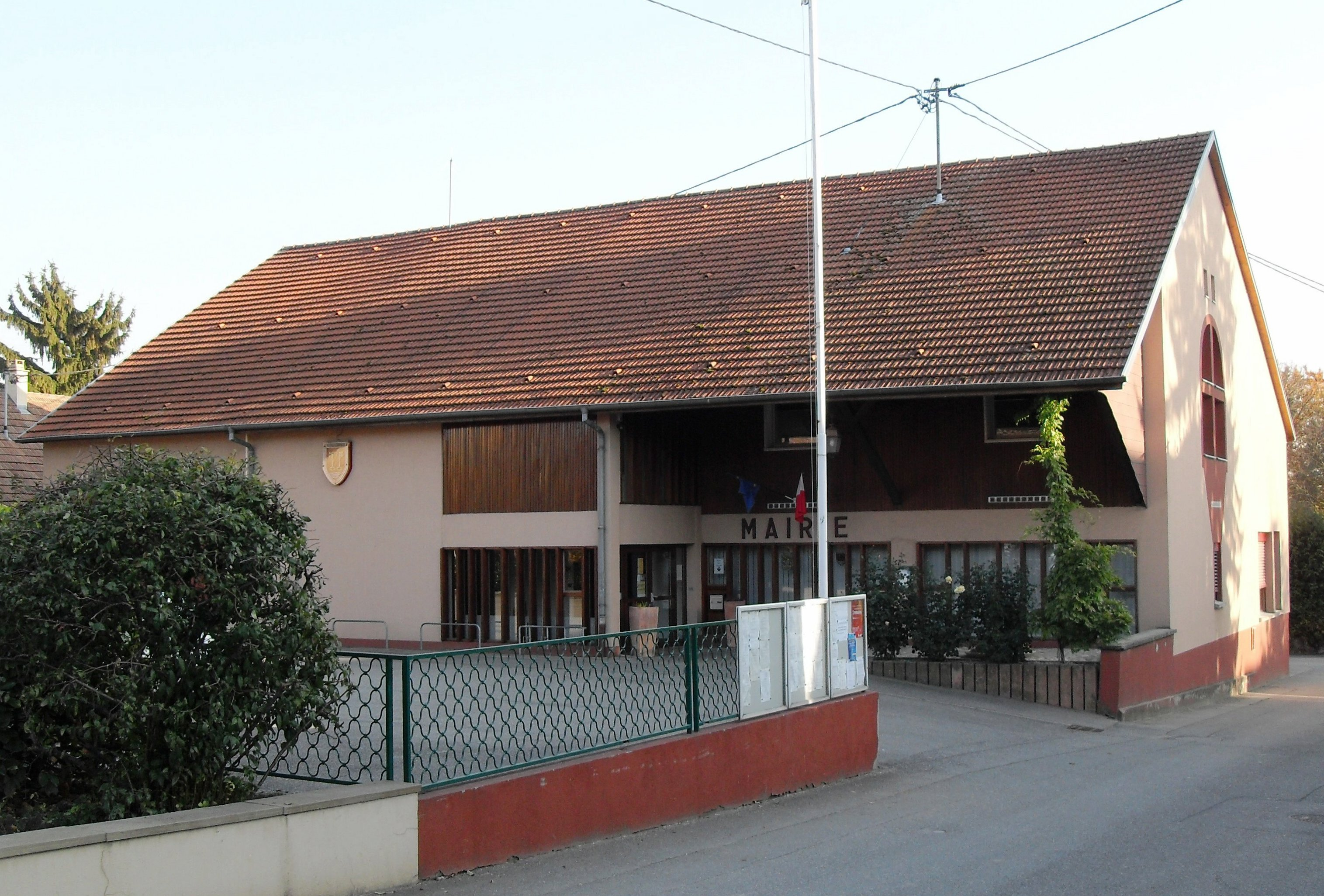 La mairie de Ranspach-le-Bas